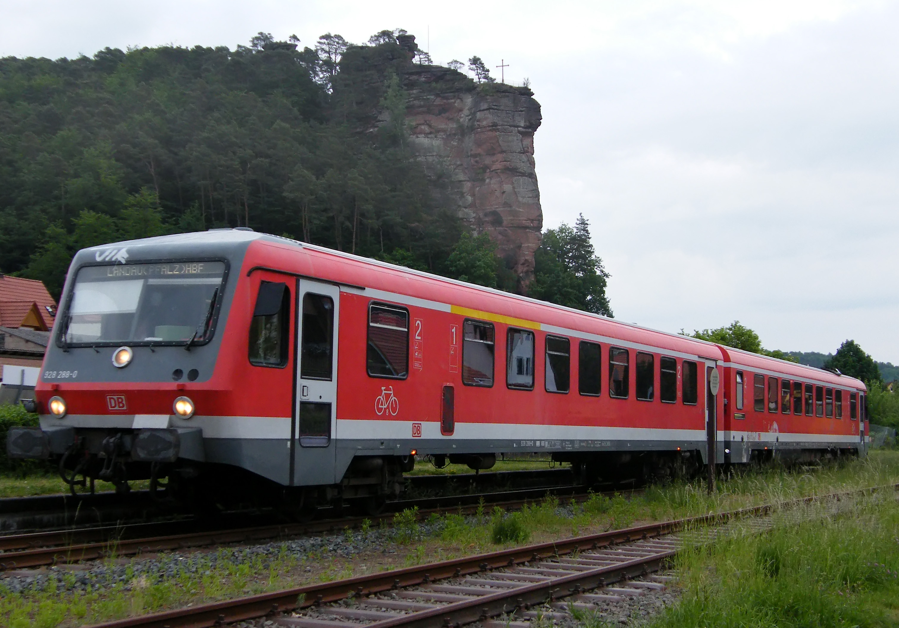 VT 628 auf der Wieslauterbahn in Dahn Bahnhof unterm Jungfernsprung